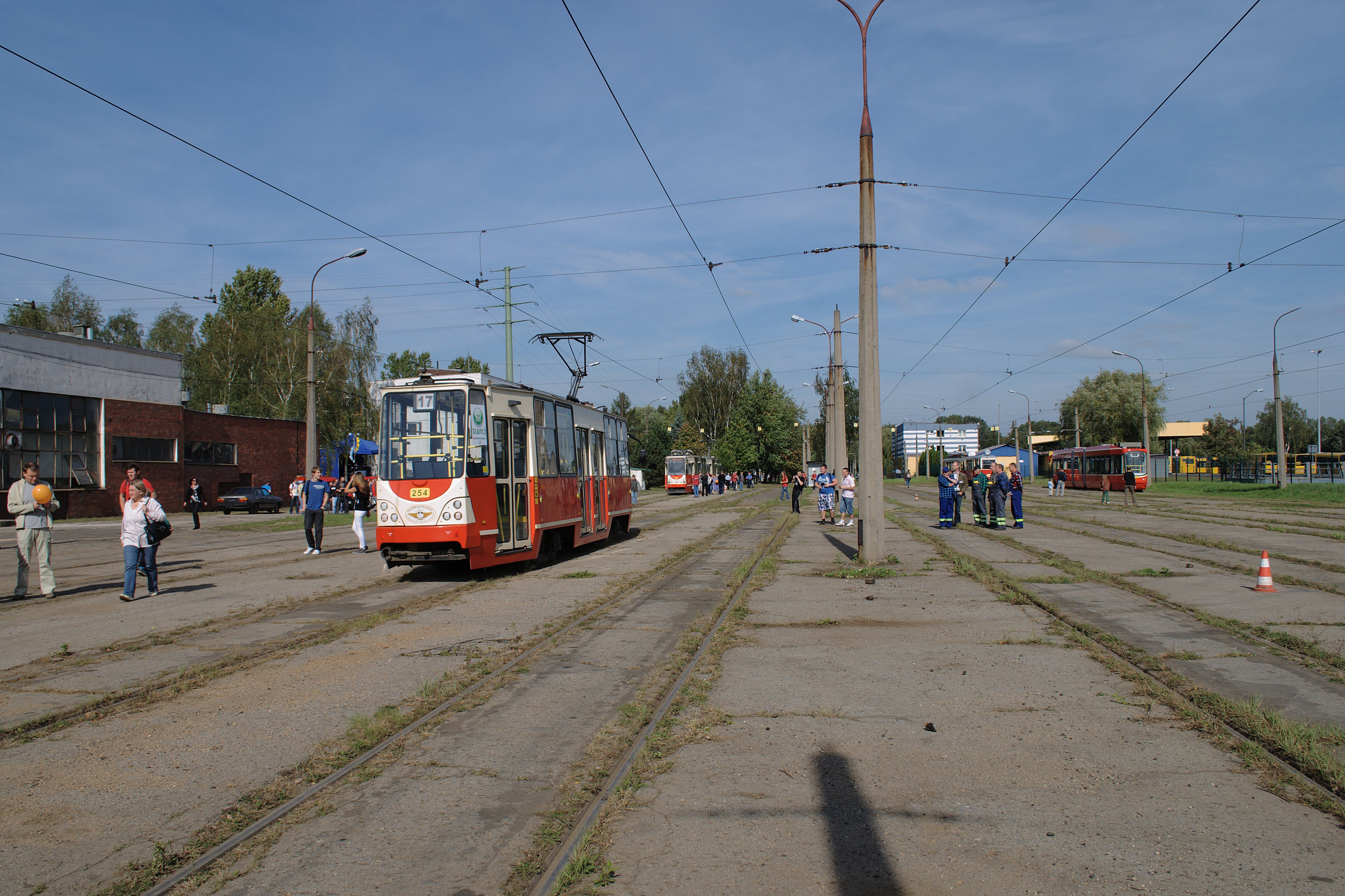 Dzień otwarty w gliwickiej zajezdni.